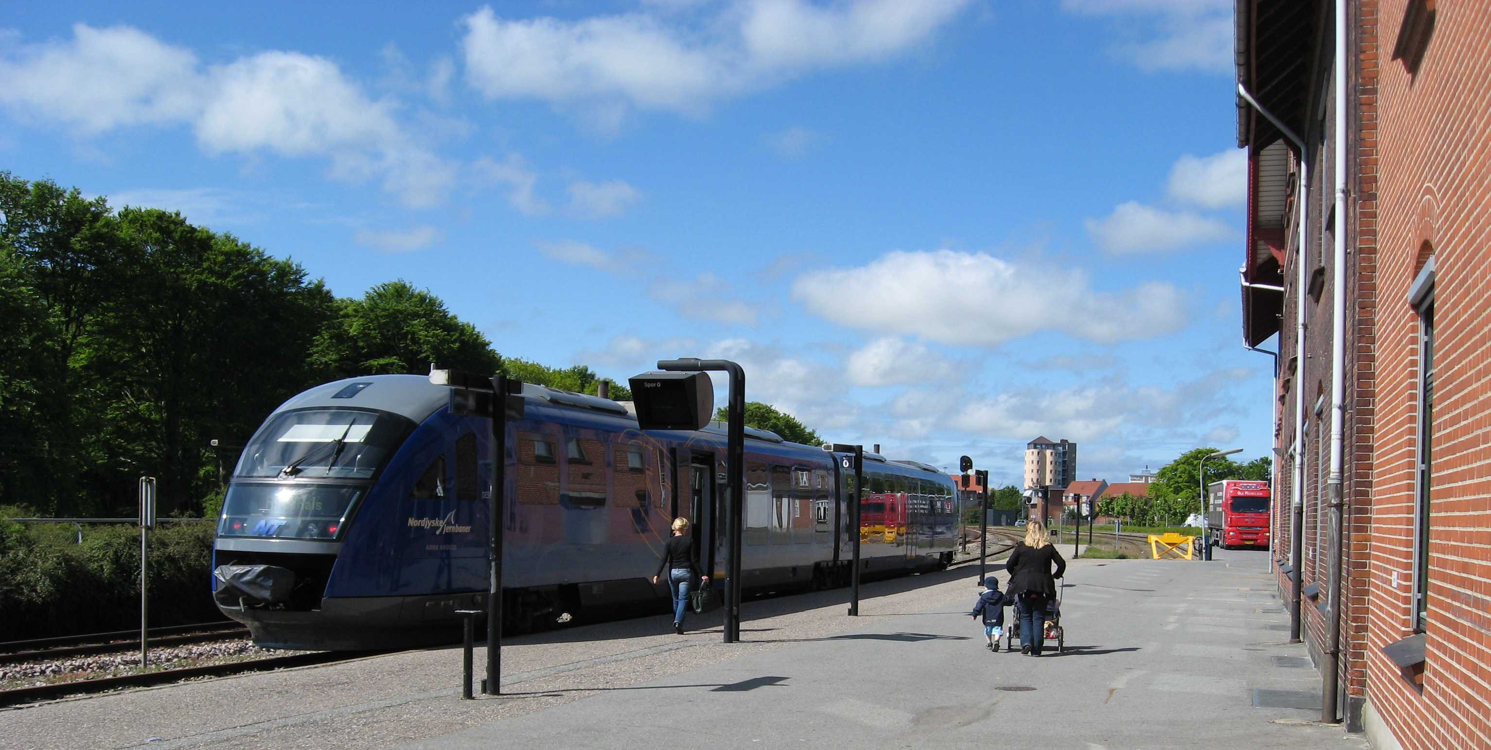 Hjørring Station er en dansk jernbanestation i Hjørring centrum, som er endestation på Hirtshalsbanen. Stationen åbnede i 1871, da Vendsysselbanen, som DSB i dag opererer på, var færdigbygget.